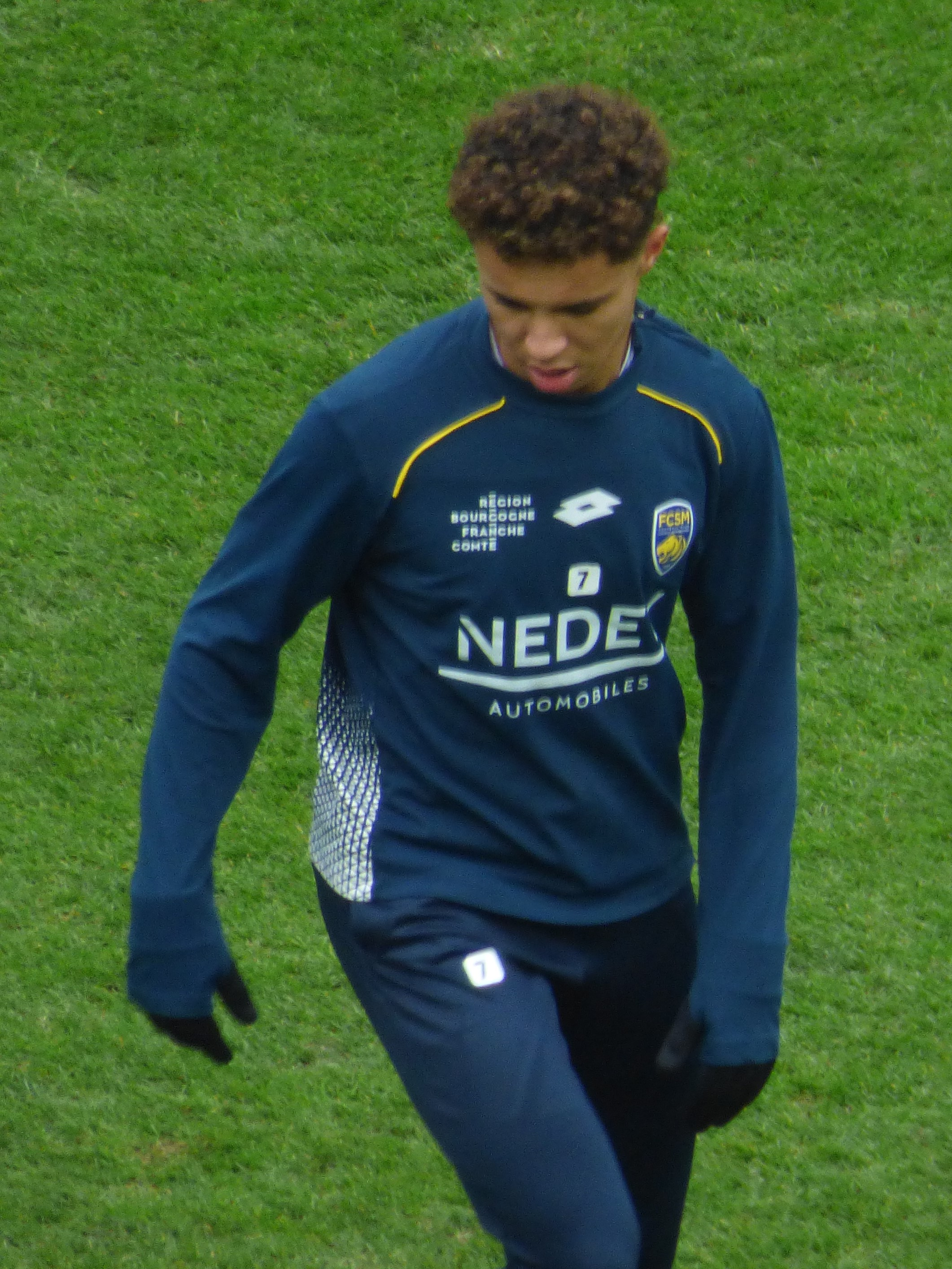 Sofiane Diop avant le match RC Lens / FC Sochaux, comptant pour la quinzième journée du championnat de France de Ligue 2 de football 2019-2020, le 23 novembre 2019, au Stade Bollaert-Delelis.